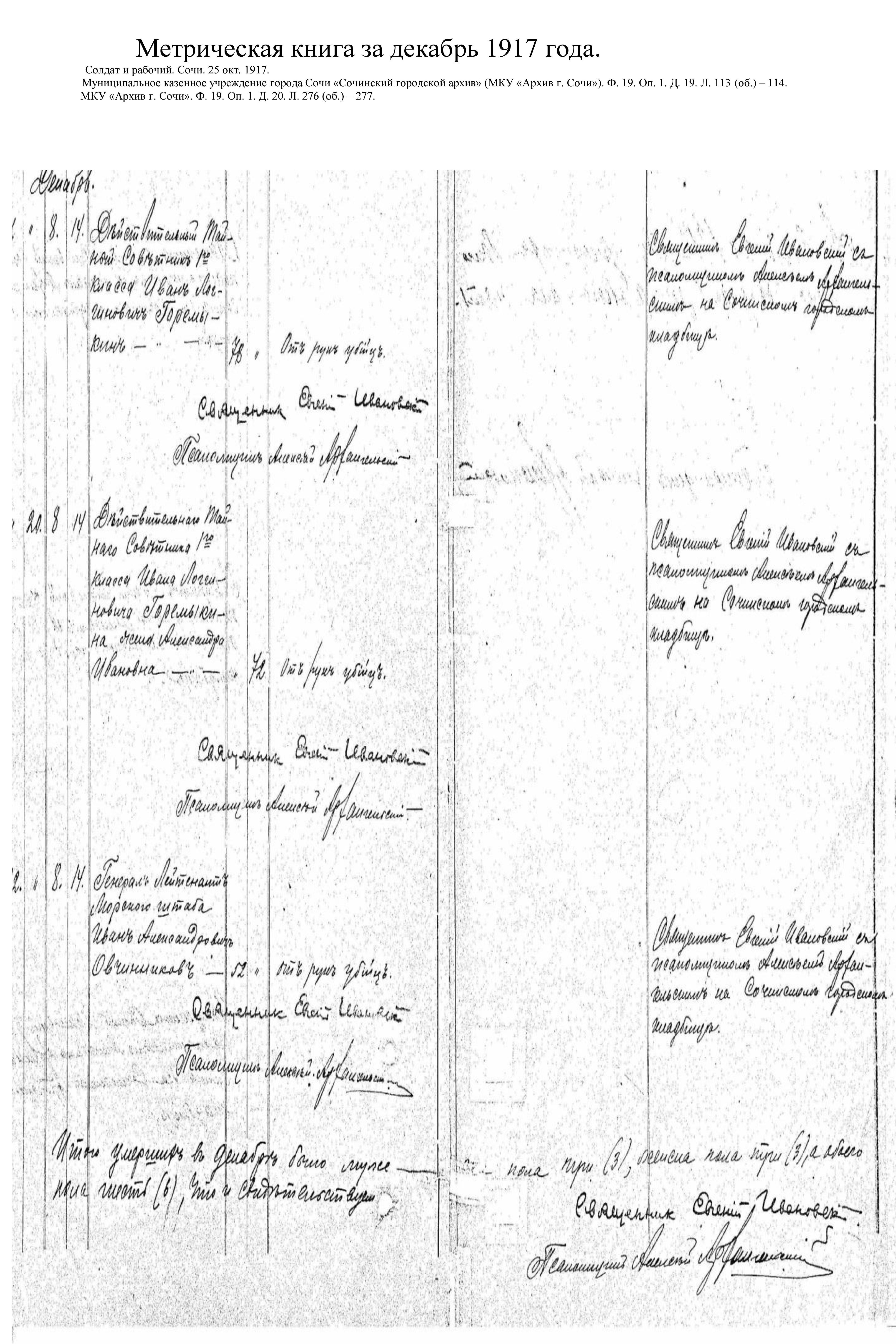 документ